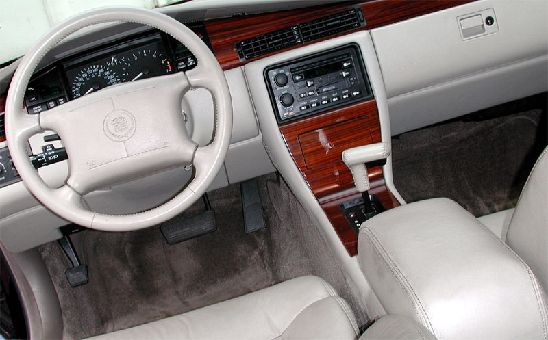 1995 Cadillac STS Innenraum